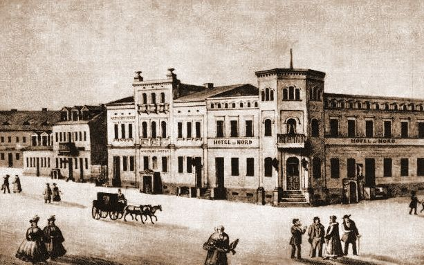 Cześciowo malowany rysunek przedstawiający południową pierzeję ul.Dąbrówki (wówczas Wilhelmińska). Zbiory Muzeum Początków Państwa Polskiego w Gnieźnie. Opublikowano w: S.Pasiciel, Gniezno. Widoki miasta 1505-1939, Warszawa-Poznań 1989